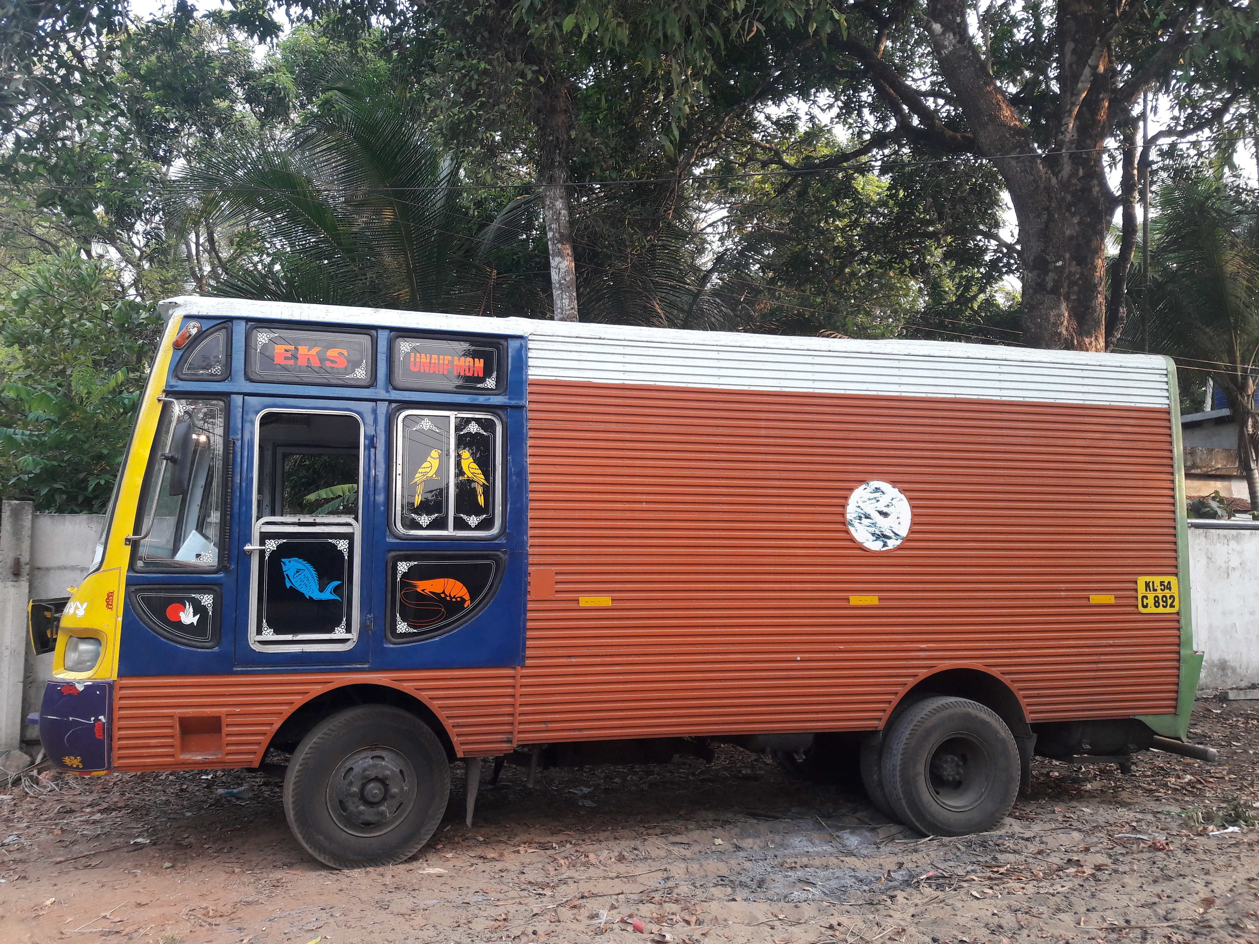 മലപ്പുറം ജില്ലയില്‍ പൊന്നാനിയില്‍ ഓടുന്ന ഒരു ട്രക്ക്.